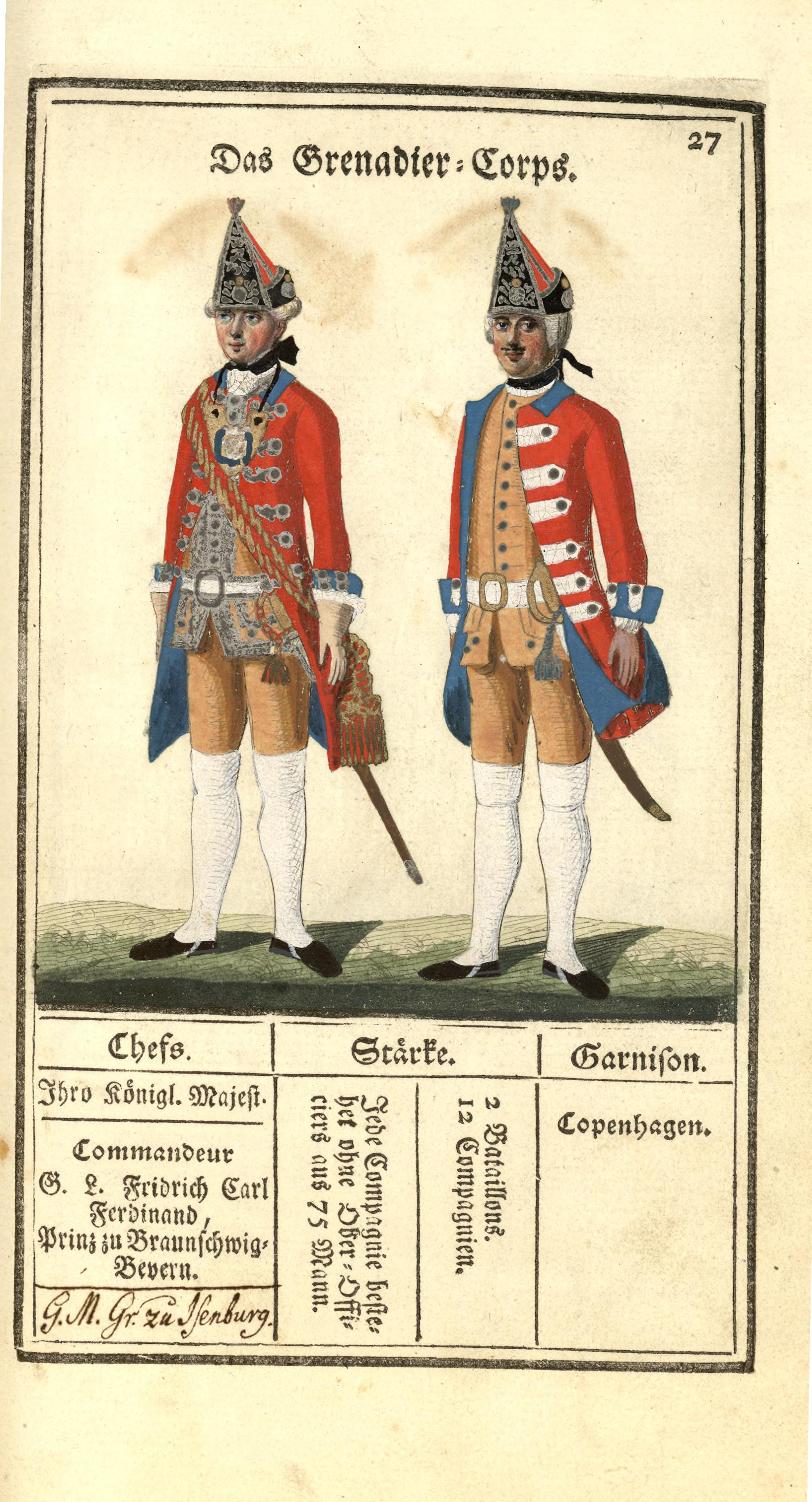 Illustrasjon hentet fra boken "Vorstellung der sämtlichen Königl. Dänischen Armee" av Bertram, Carl og utgitt av Carl Bertram (dk, 1763)